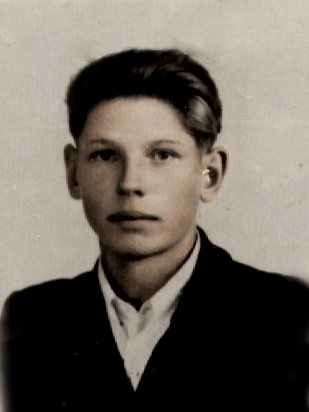 Józef Czyż, pseudonim „Kula” (ur. 1933 r. we wsi Jasionowo k. Suwałk, zginął 1 VIII 1950 r.). Uczył się w suwalskim liceum ogólnokształcącym, gdzie włączył się w działalność młodzieżowych organizacji niepodległościowych. w 1949 r. podczas napadu na milicjanta zdobył broń palną, co pozwoliło mu formalnie przystąpić do nielegalnej Harcerskiej Grupy Pogromców Komunizmu. Wraz z innymi uczestniczy w akcjach przeciw władzy komunistycznej, których celem jest zdobycie środków na prowadzenie działalności. Grupa powiększa się i zmienia nazwę na Konspiracyjną Organizację Młodzieżową. Ostatecznie nawiązują współpracę z oddziałem partyzanckim Piotra Burdyna i Janda Sadowskiego. 1 VIII 1950 r. wskutek zdrady Janiny Korzenieckiej (agentka UB), mieszkającej w domu rodzinnym Czyżów, Józef wraz z bratem Henrykiem zostaje otoczony przez oddziały UB – KBW. Podczas ucieczki z okrążenia obaj giną.